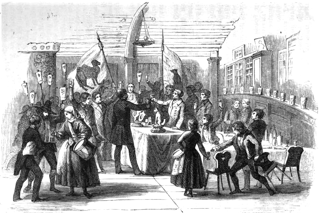 Das Sechseläuten in Zürich Die Begrüßung der Zünfte